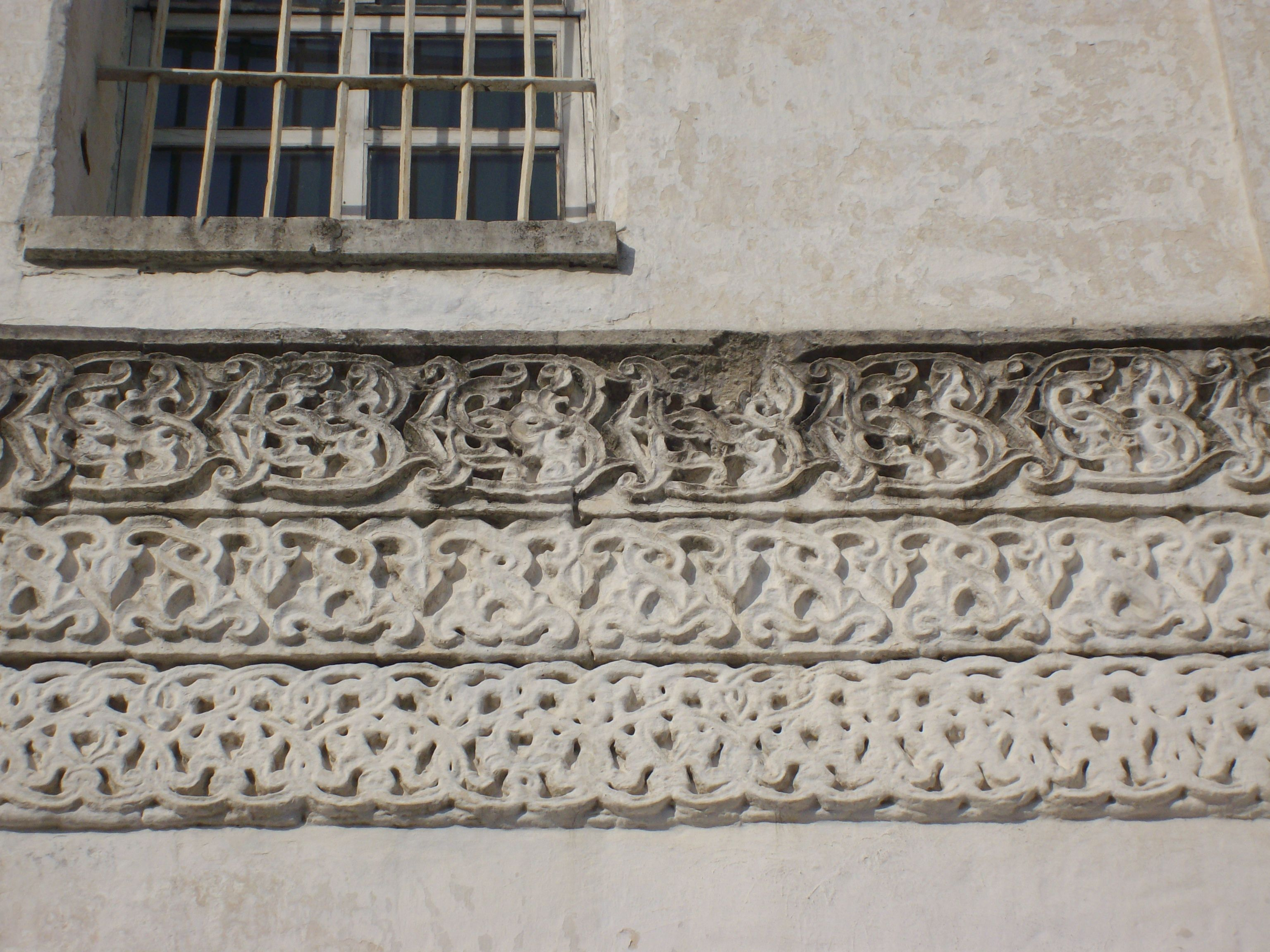 Успенский собор на Городке в Звенигороде. Около 1399 года.